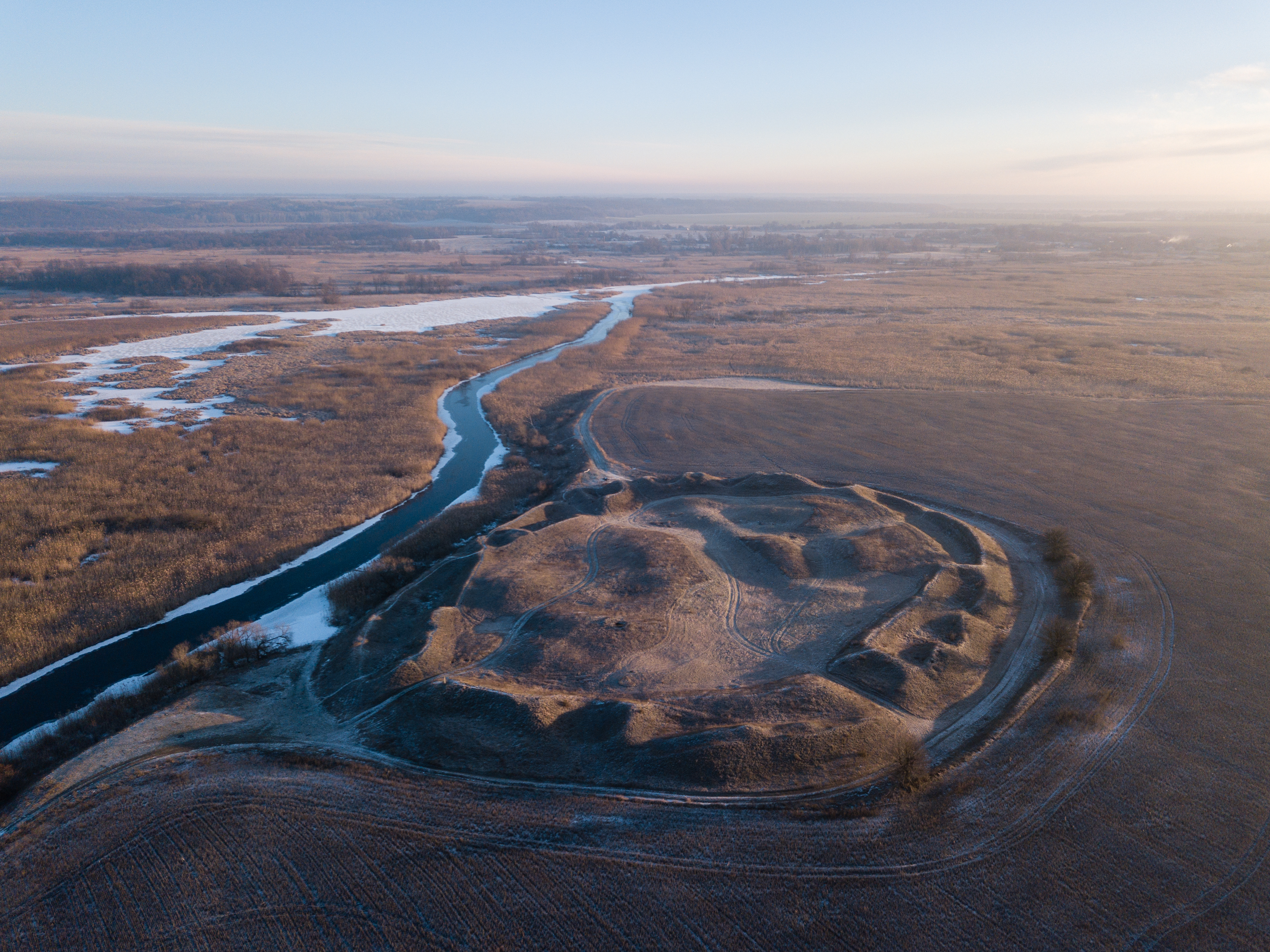 Городище давньоруського міста Полкстінь